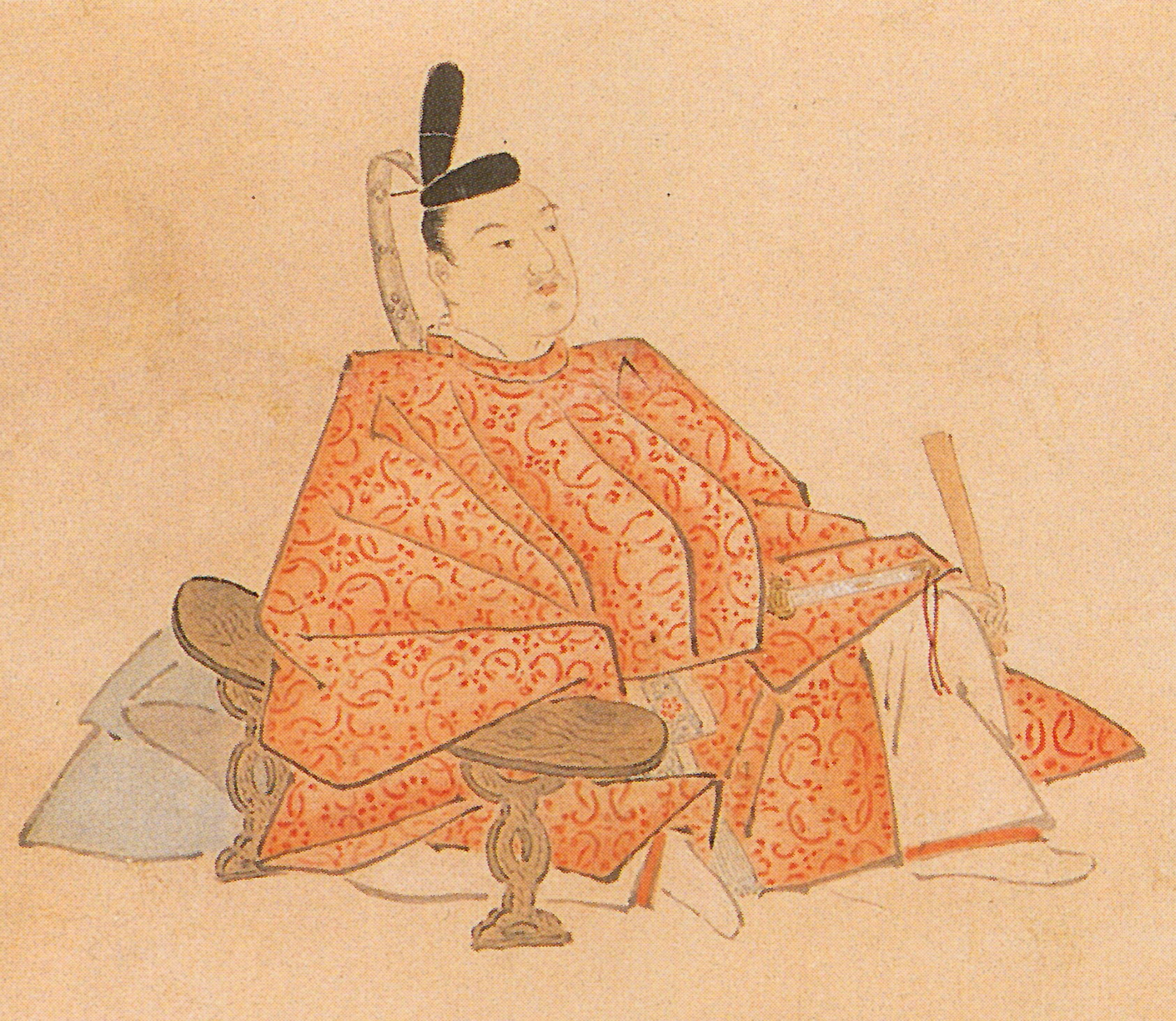 小堀正之(宗慶)の肖像。